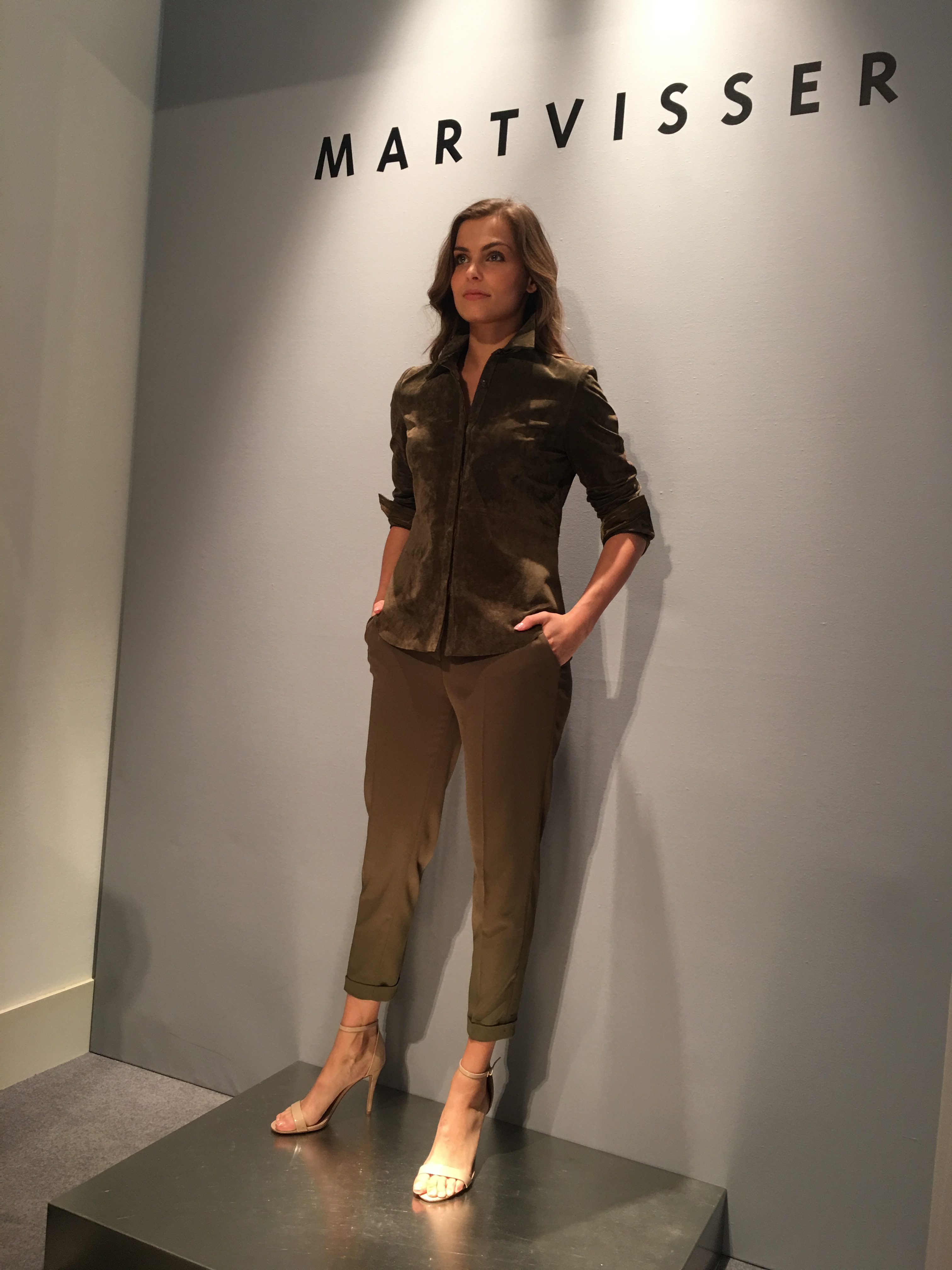 Modeshow bij Mart Visser in Amsterdam op 12 april 2017, Voorbeeld van collectie pret a porter zomer 2017.